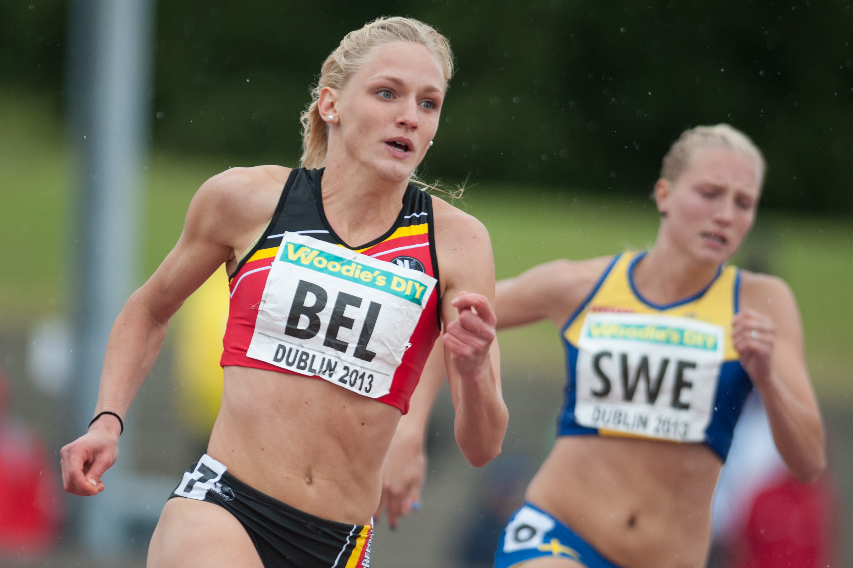 Hanne Claes in actie tijdens het EK voor landenteams in 2013, Dublin